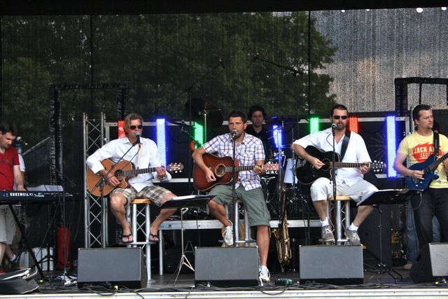 Die niederösterreichische Band Austrotop bei einem Auftritt am Radio Wien-Wandertag.